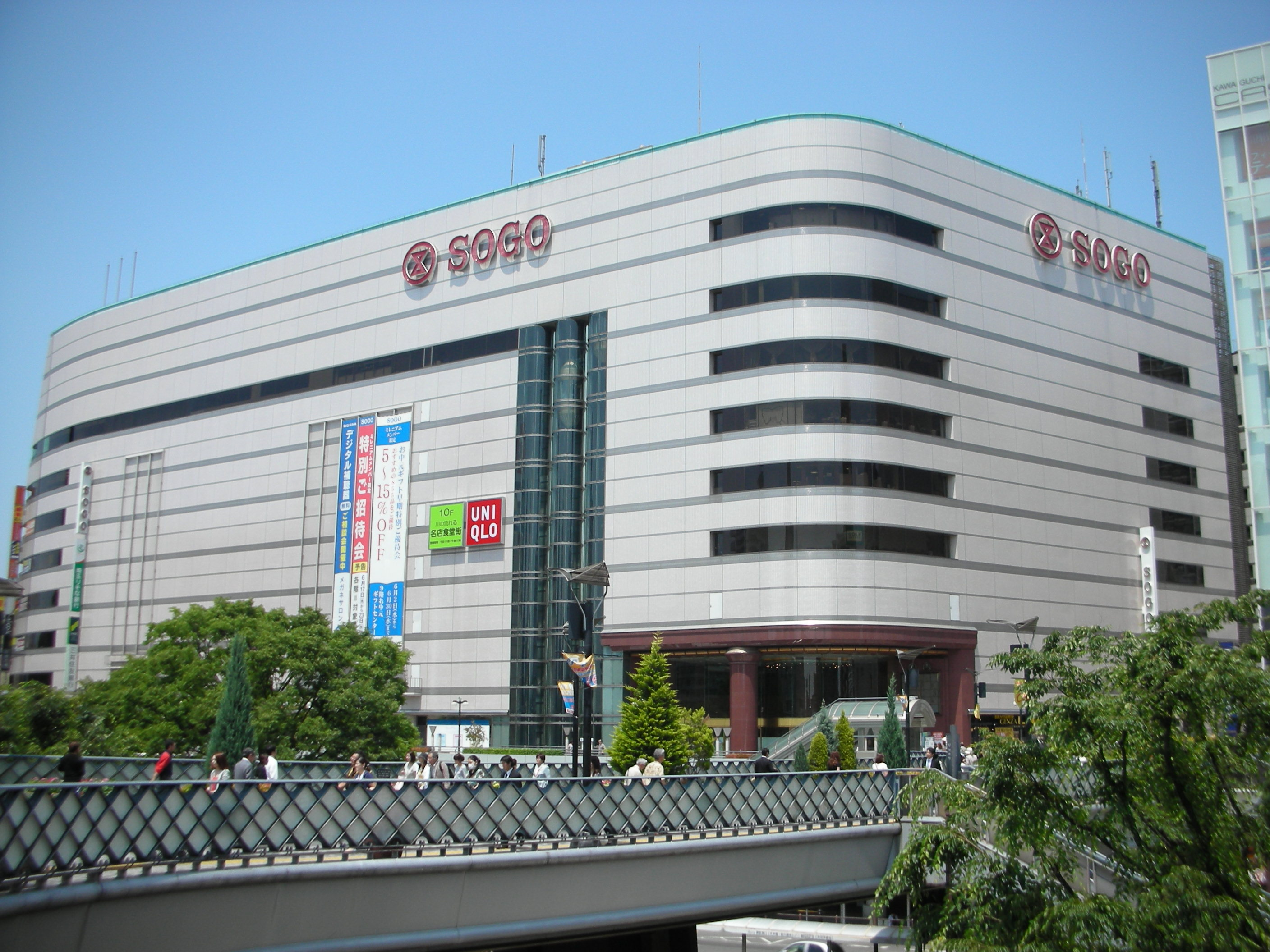 そごう川口店の外観